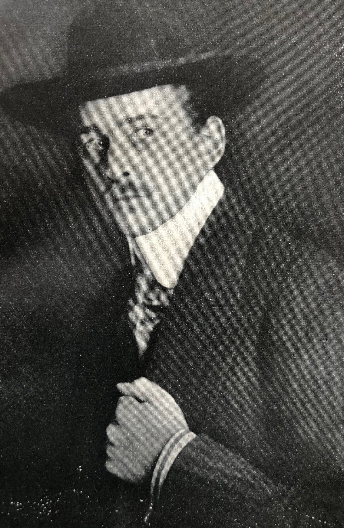 Fotographie